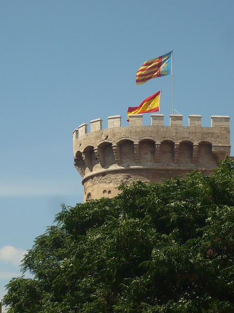 Vista de las Torres desde el Convento de la Encarnación en Guillem de Castro de Valencia.